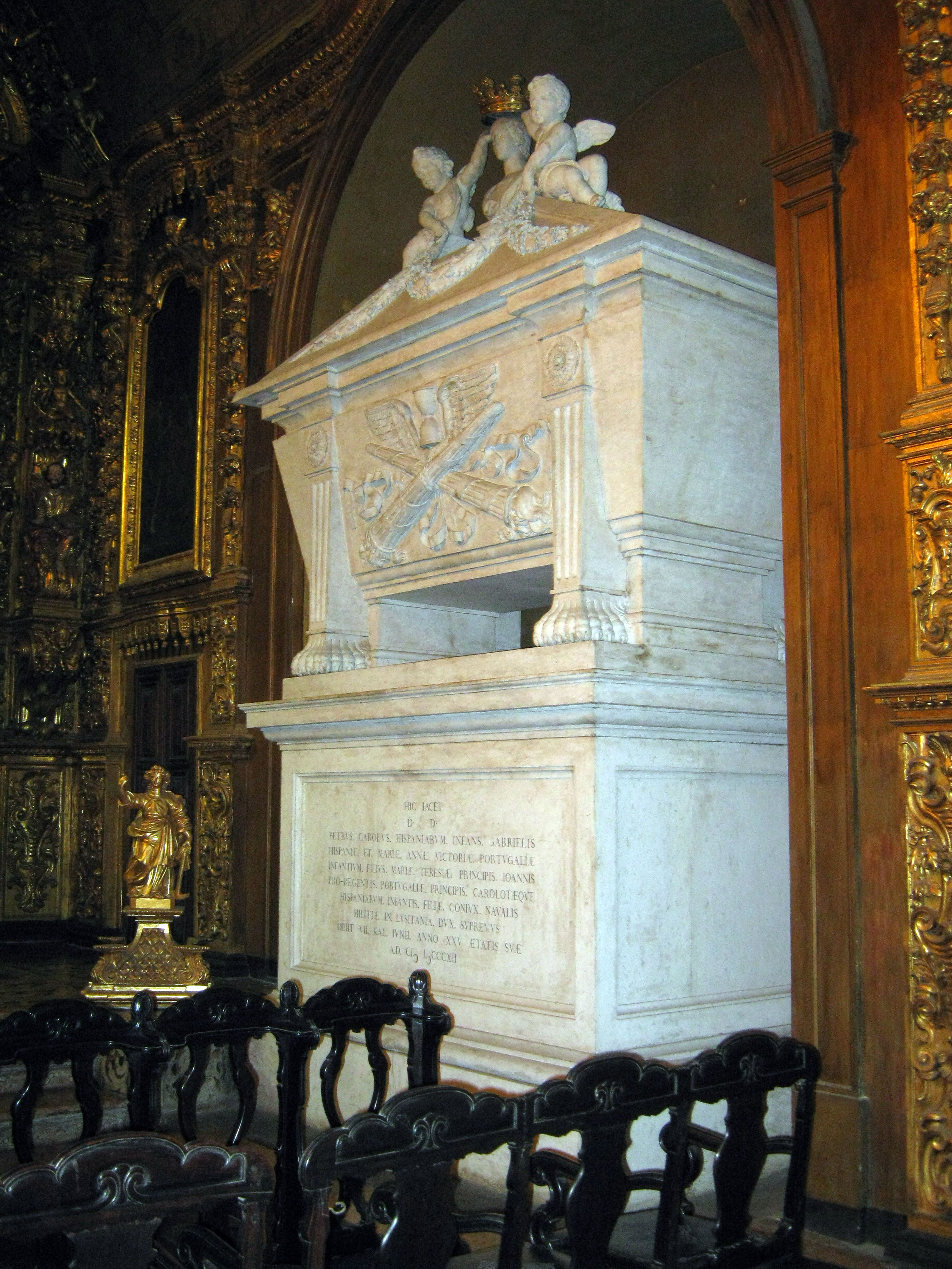 Mausoléu do Infante de Espanha Dom Pedro Carlos no Convento de Santo Antônio do Rio de Janeiro.